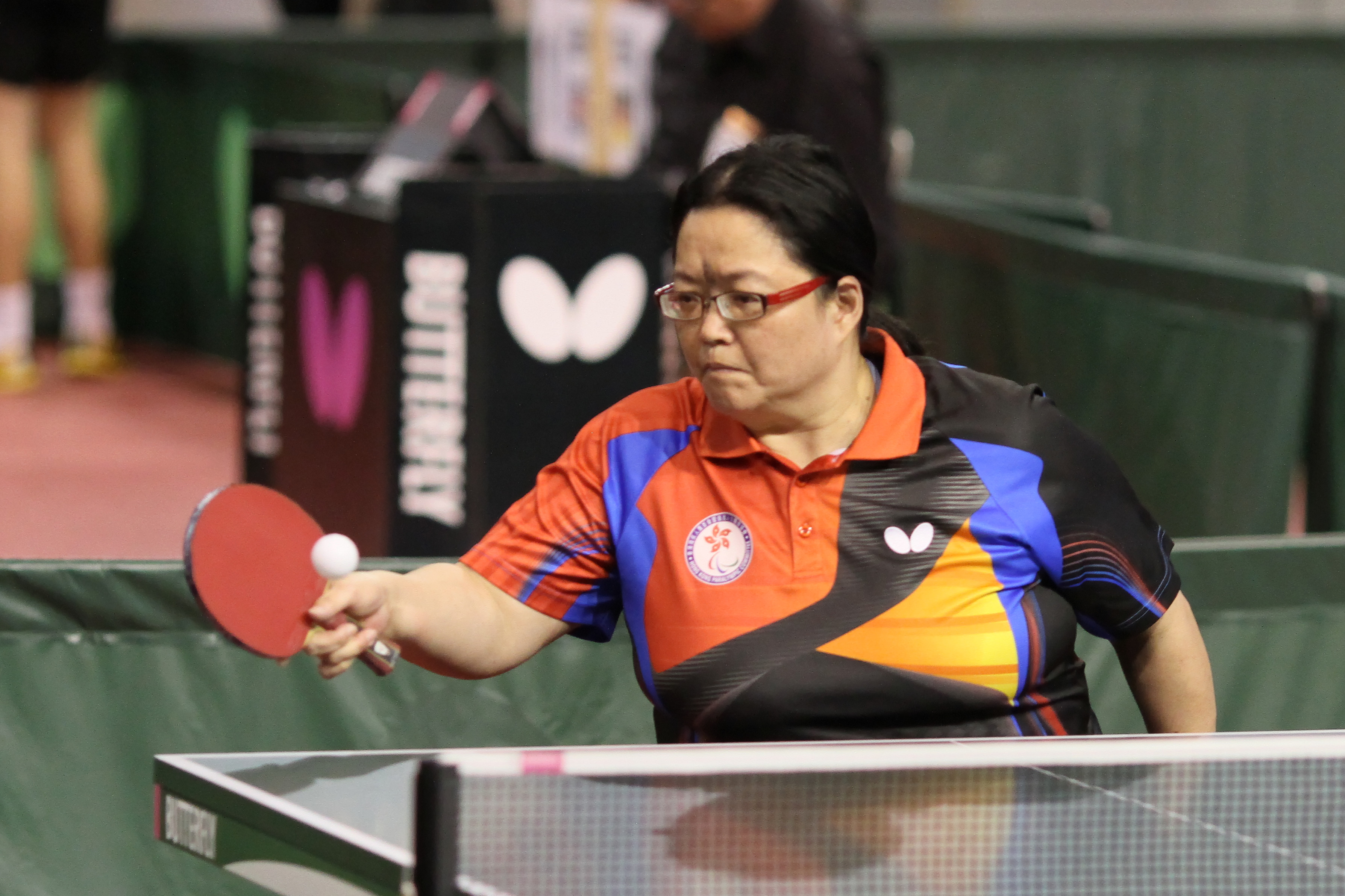 WONG Pui Yi (HKG, F5) IMG_7486_DxO